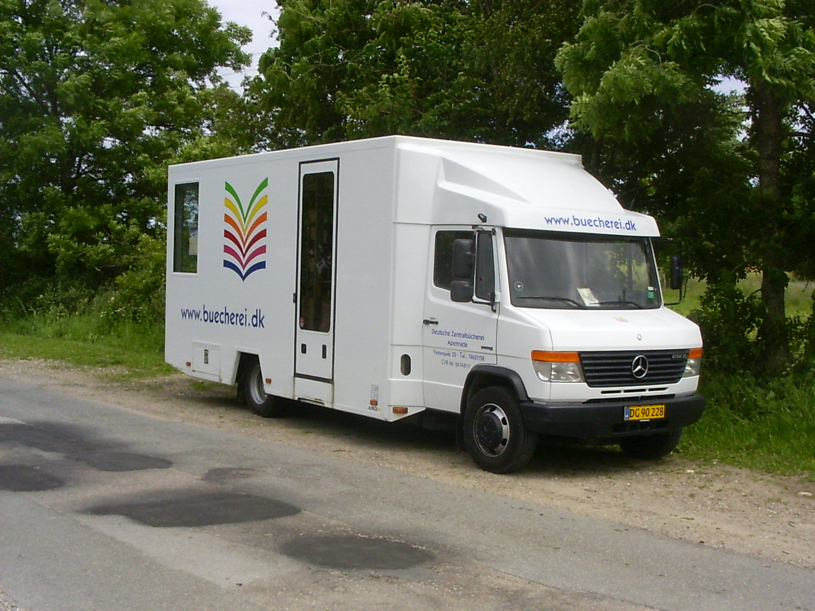 Apenrade, Duitstalige bibliobus